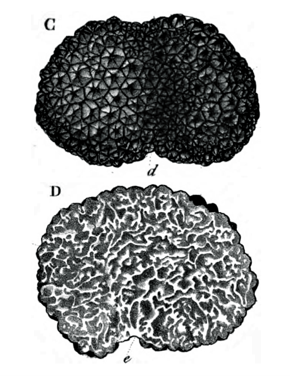 Tuber aestivum Vittad. (1831) nom. illeg., korrekt Tuber aestivum (Wulfen, 1786) Spreng. (1827)